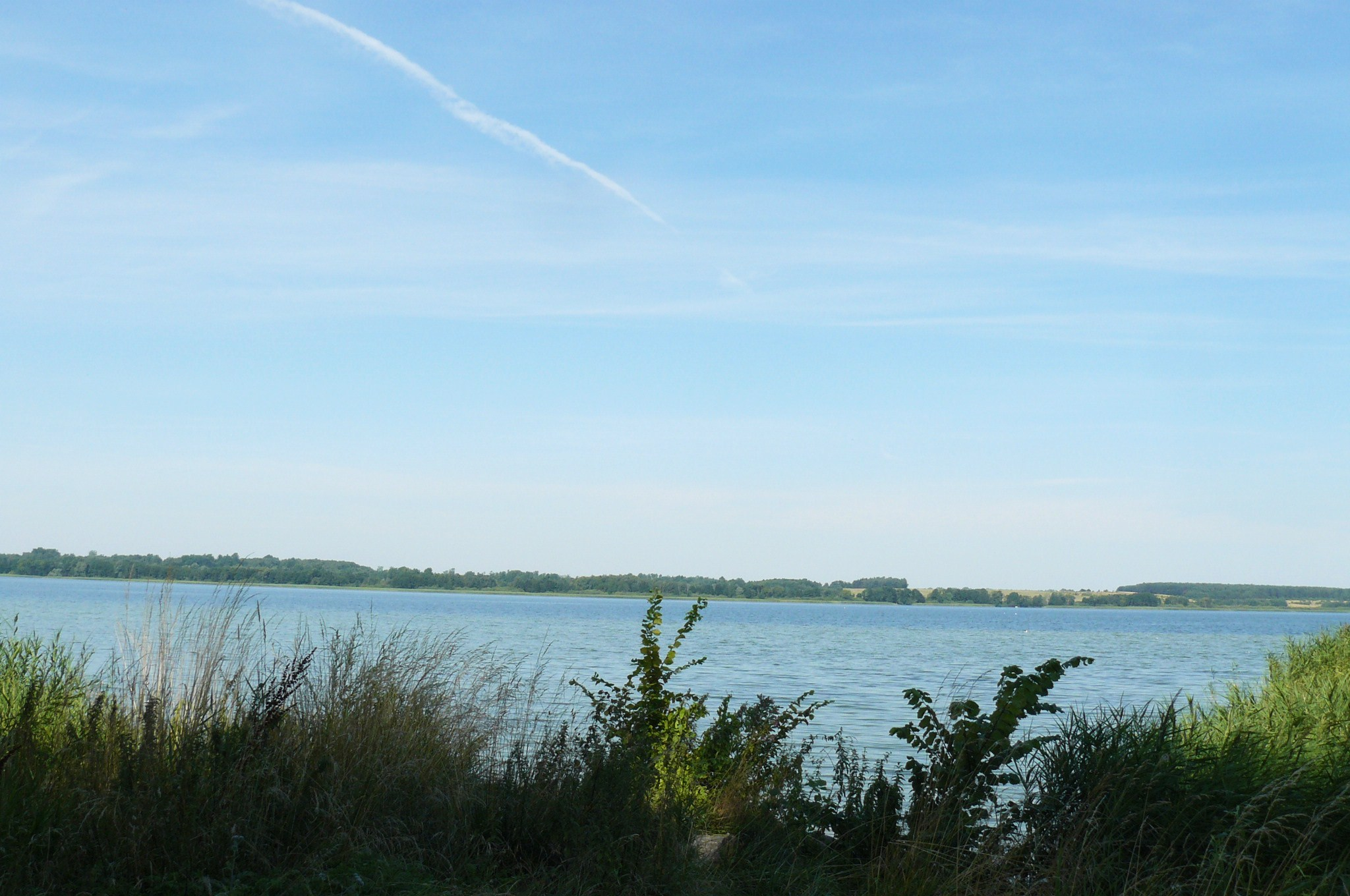 Miedwie z Wierzchlądu.